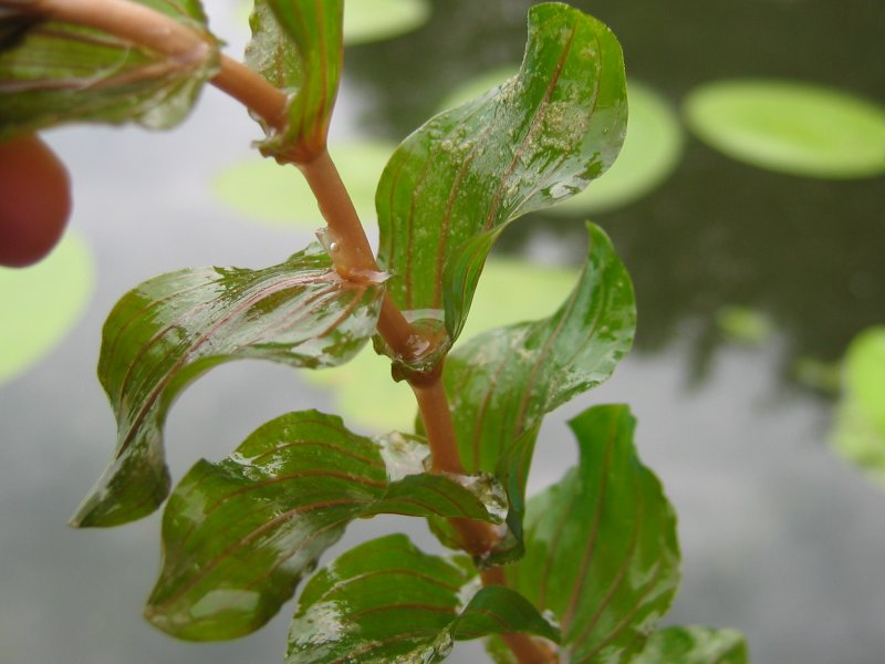 Stängelumfassendes Laichkraut Potamogeton prfoliatus, Müritz-Gebiet